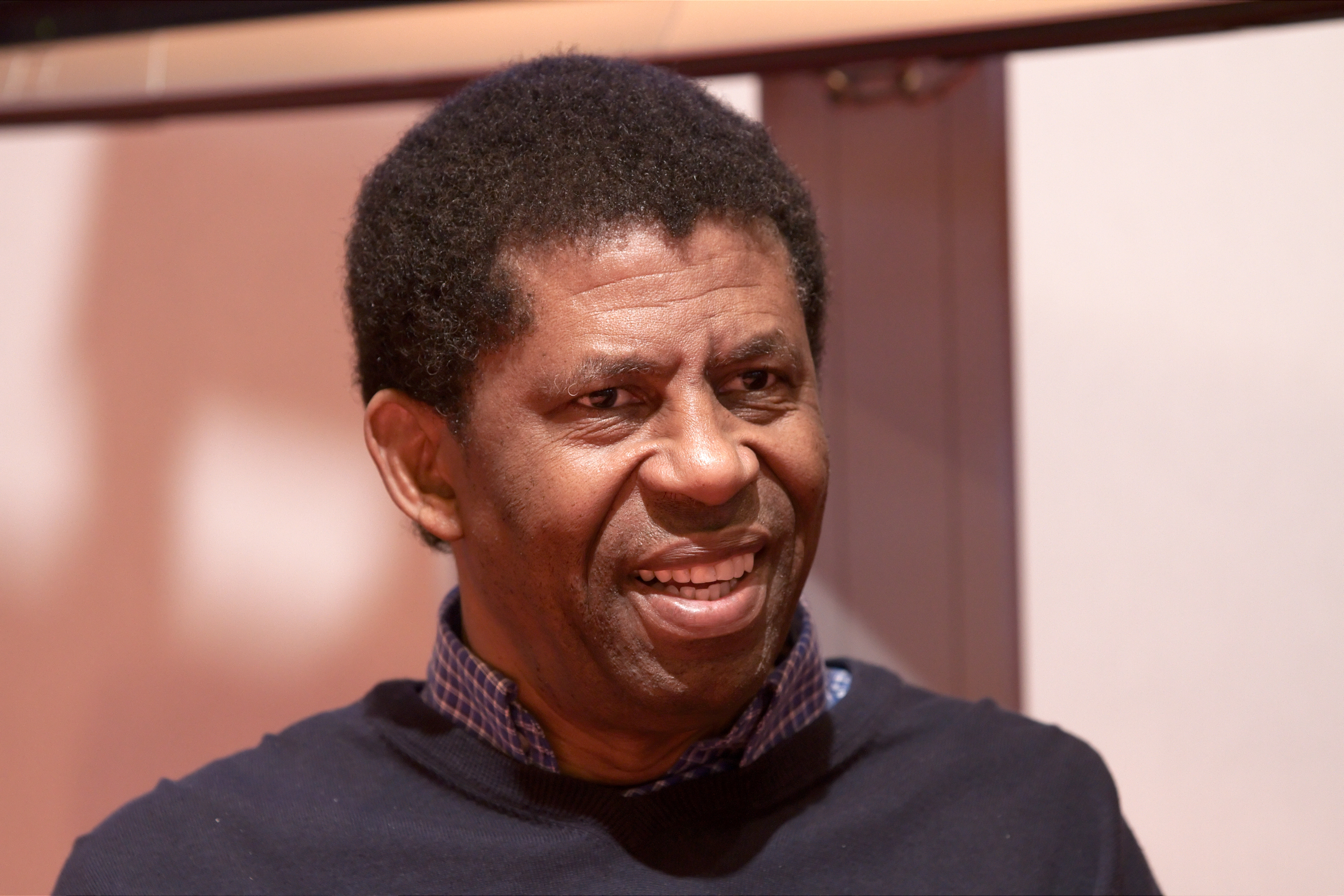 Dany Laferrière lors du Salon du livre de Paris durant un débat sur Haïti organisé par le magazine L'Express.